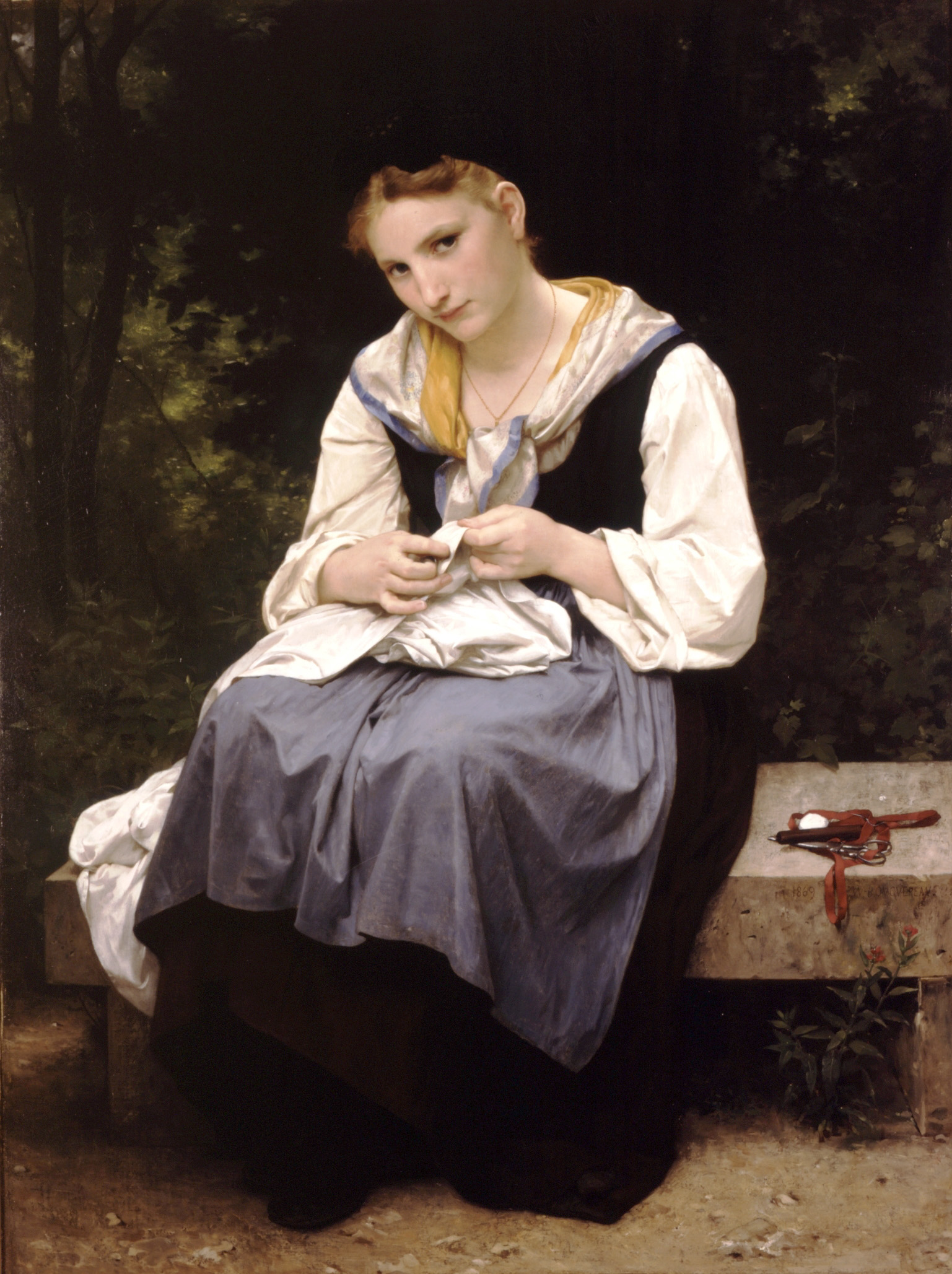 Jeune ouvrière by William-Adolphe Bouguereau (1825-1905)